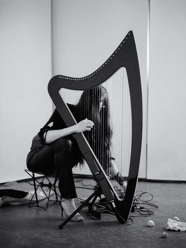 Hélène Breschand